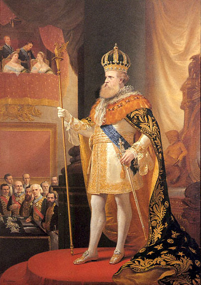 Impresso reproduzindo um quadro de Pedro Américo que mostra dom Pedro II por ocasião da Fala do Trono, na abertura da Assembleia Geral, no dia 3 de maio de 1872. Veem-se, à esquerda, na parte inferior, figuras importantes do cenário político do Império: Antonio Paulino Limpo de Abreu, o visconde de Abaeté, que era presidente do Senado; o marquês, depois duque de Caxias, Luiz Alves de Lima e Silva; e José Maria da Silva Paranhos, o visconde do Rio Branco, que era também presidente do Gabinete e ministro da Fazenda. Na tribuna, na parte superior: a imperatriz d. Teresa Cristina, a princesa Isabel e o conde d'Eu e, ao fundo, Joaquim Marques Lisboa, o marquês de Tamandaré.